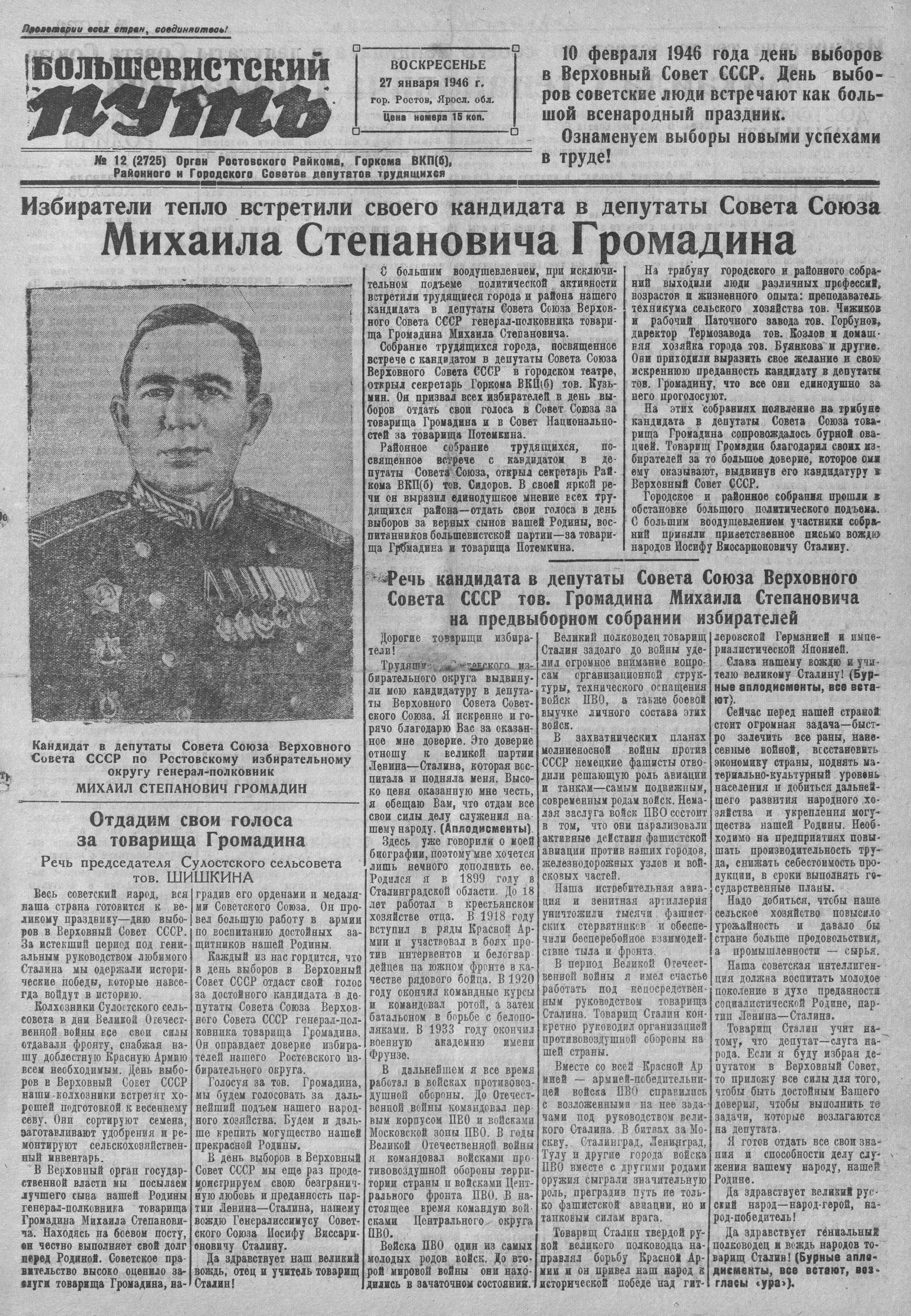 Статья о М.С. Громадине из газеты "Большевистский путь", Ростовского района Ярославской области